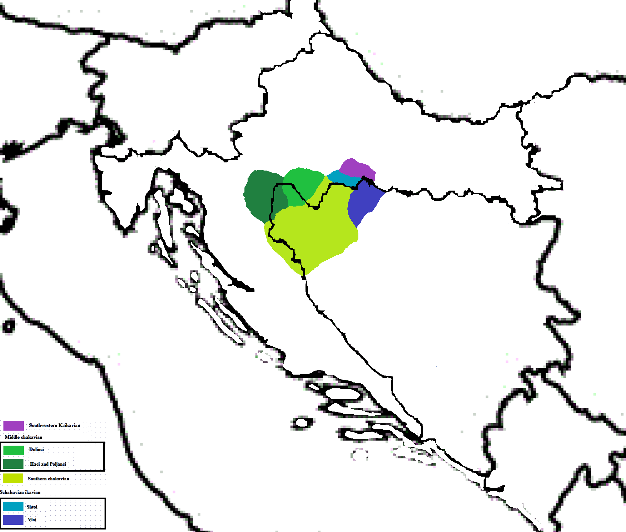 Teorija od podrijetlu gradišćanskohrvatskih kao srodnih govora iz Hrvatske